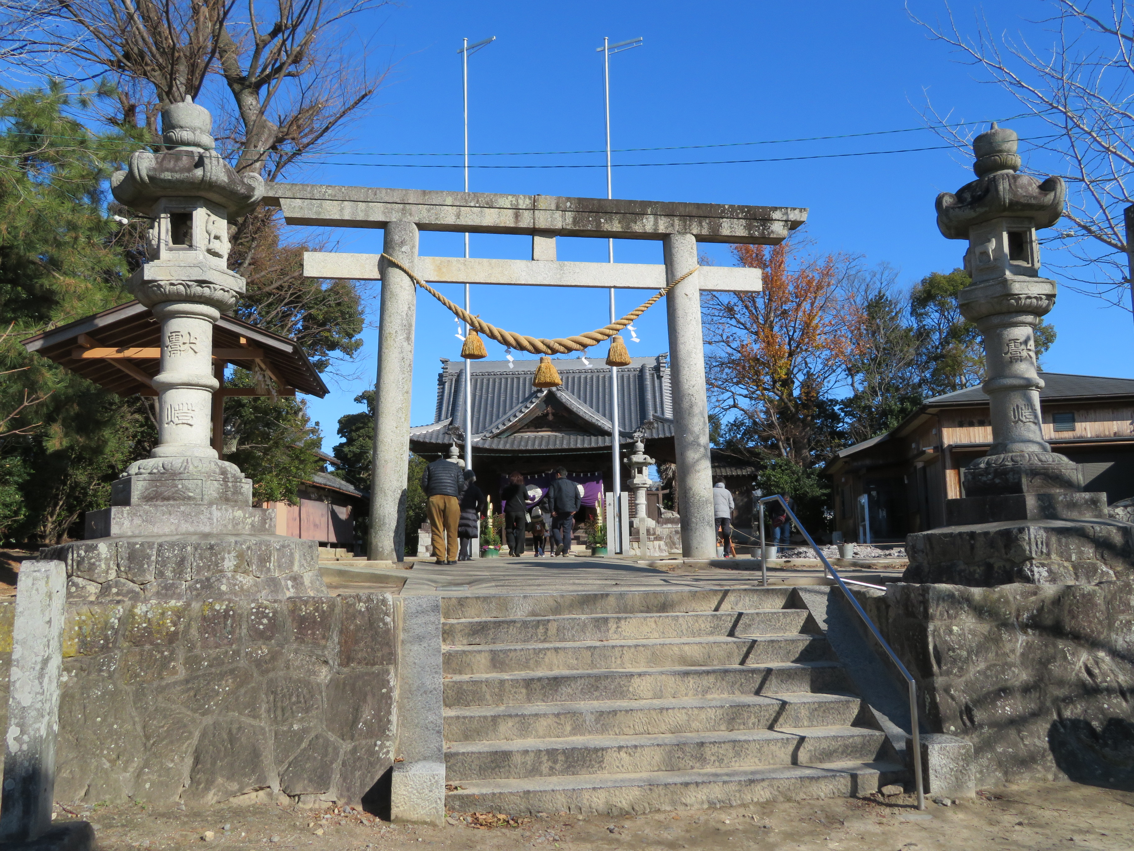 春日神社（岡崎市若松町）